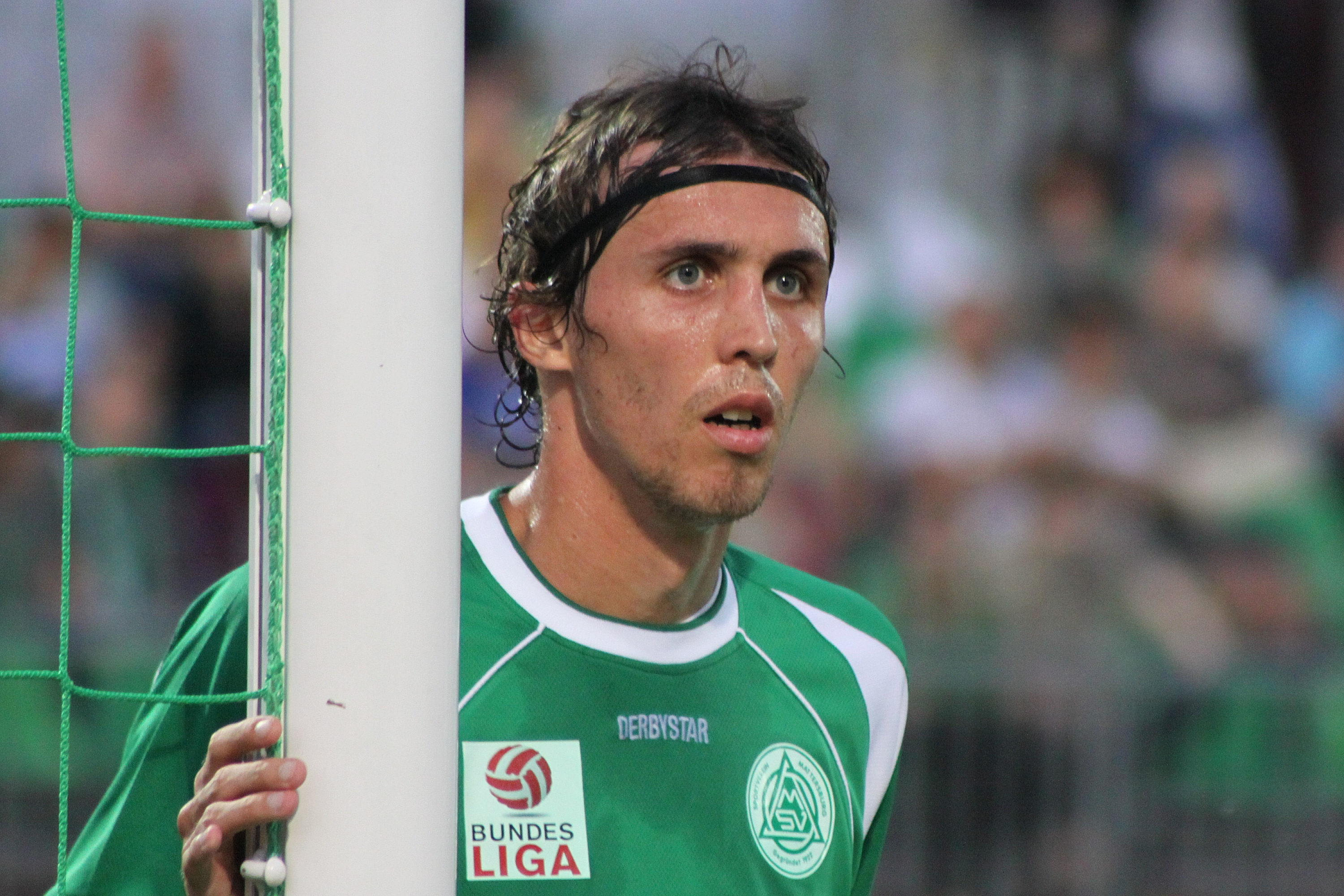 Josef Hamouz - SV Mattersburg (2)